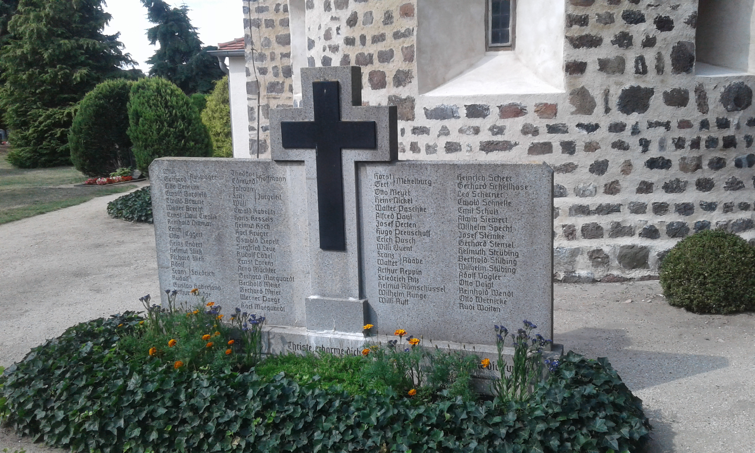 Kriegerdenkmal